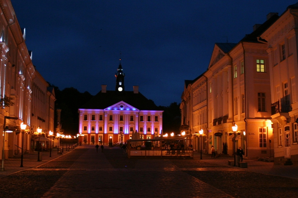 Välisvalgustus Tartus Raekoja platsil, 2007